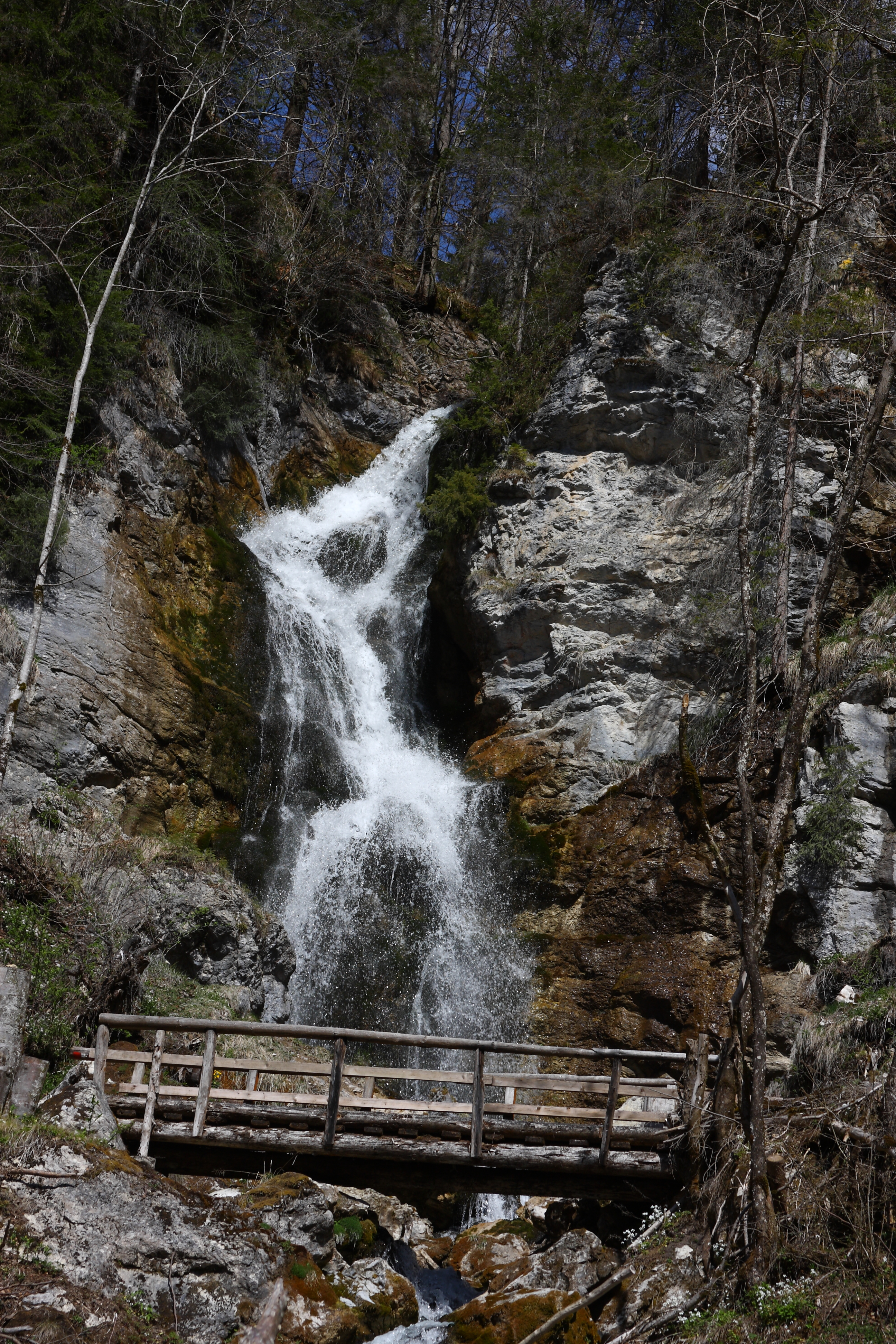 Luserfall, Haus im Ennstal, Steiermark, Österreich This media shows the natural monument in Styria with the ID 1374.